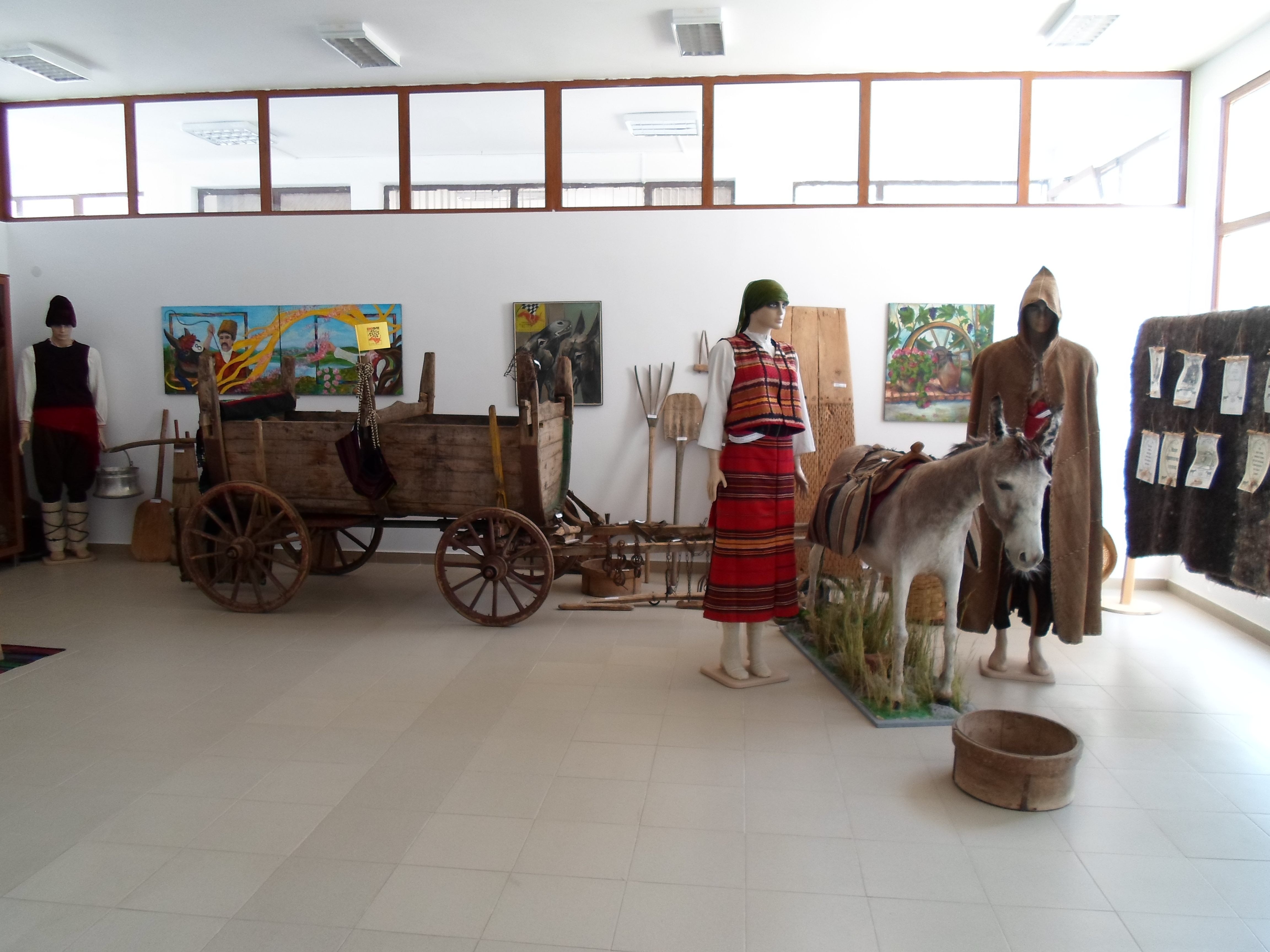 Музей на магарето, гр. Гурково, 2015 г.